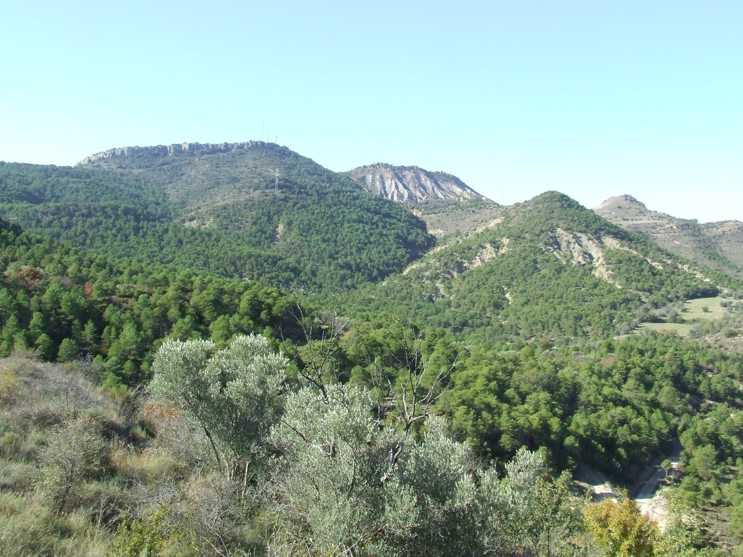 Capçalera del barranc de Rubiol (Orcau, Isona i Conca Dellà, Pallars Jussà)